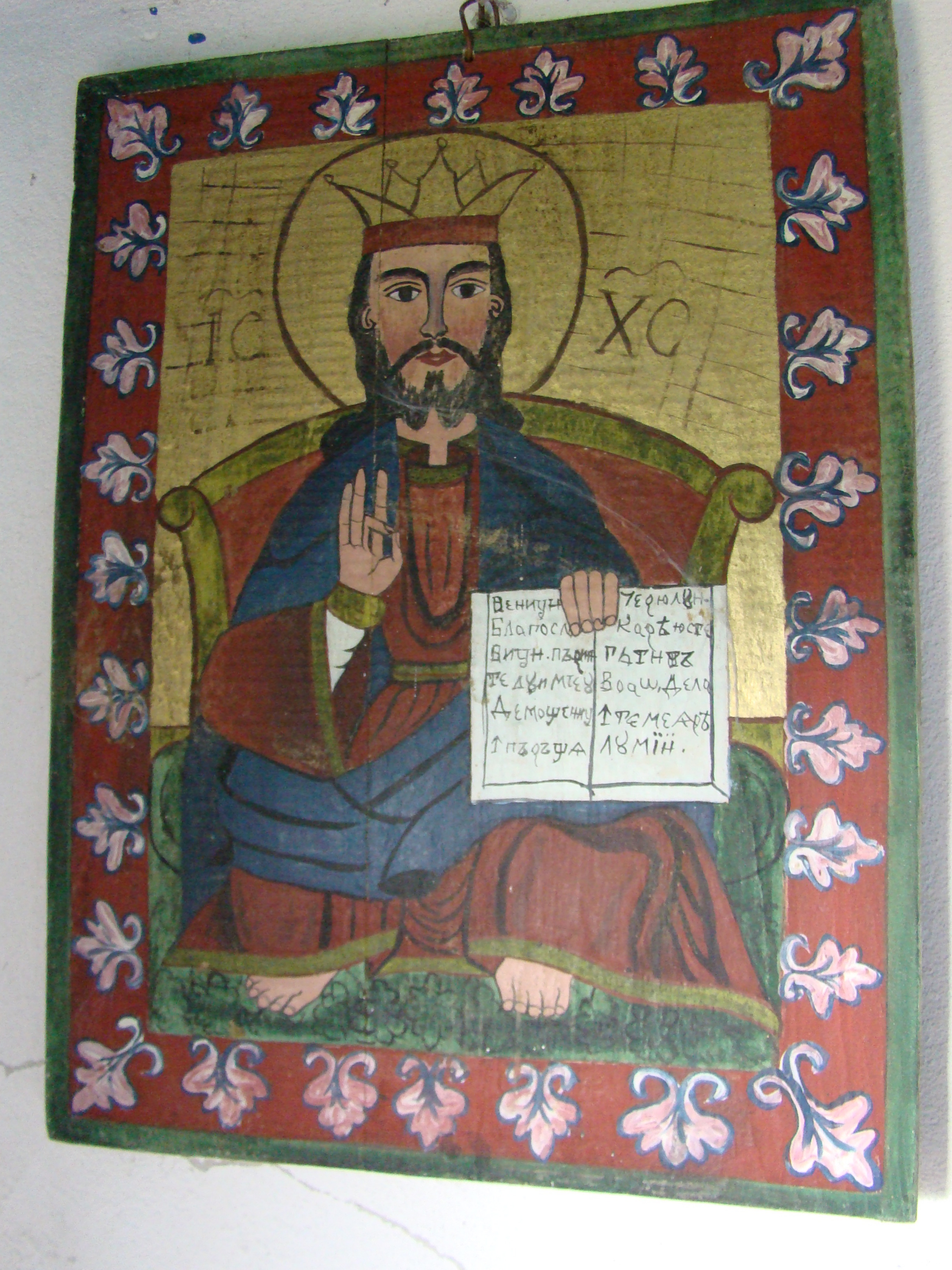 Biserica de lemn "Sf. Ioan Evanghelistul" , sat IZVOARELE; comuna CERNEŞTI